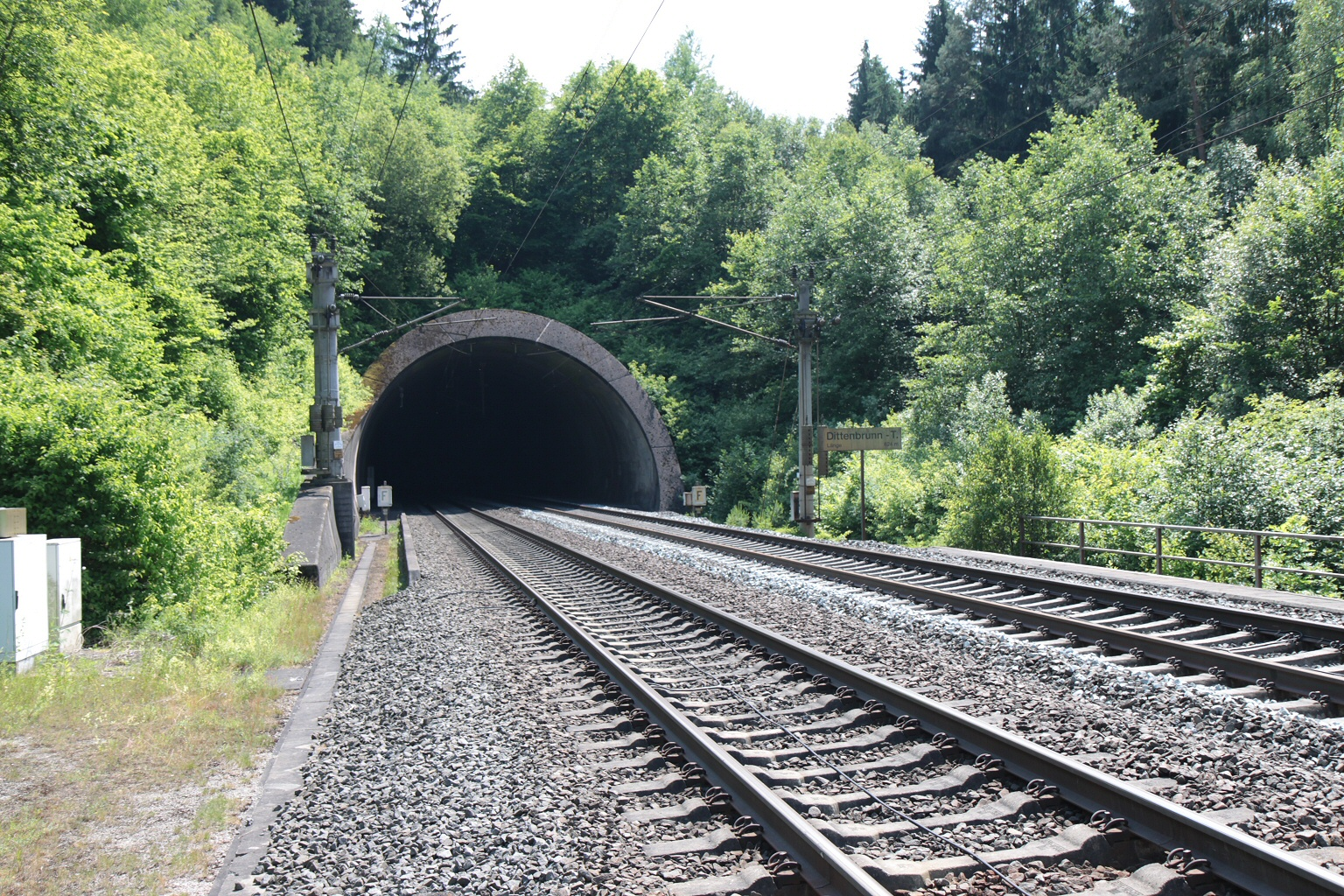 Das Nordportal des Dittenbrunntunnels an der Schnellfahrstrecke Hannover–Würzburg